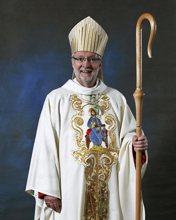 Monseigneur Luc Bouchard, évêque du diocèse catholique de Trois-Rivières, en Mauricie (Québec)